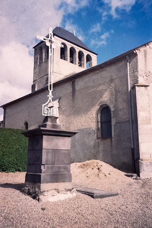 Saint Martin vue de Front